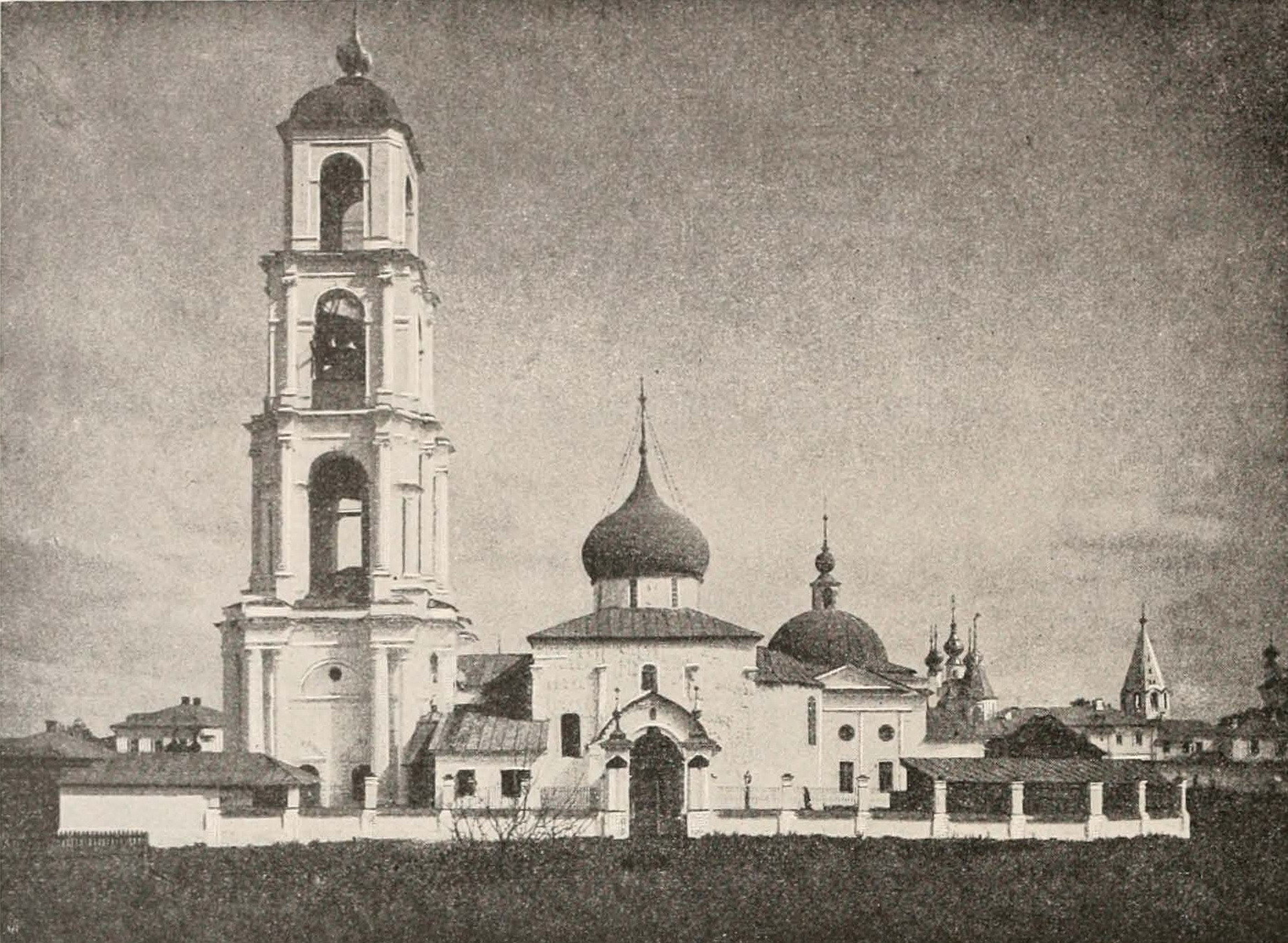 Георгиевский собор (Юрьев-Польский)